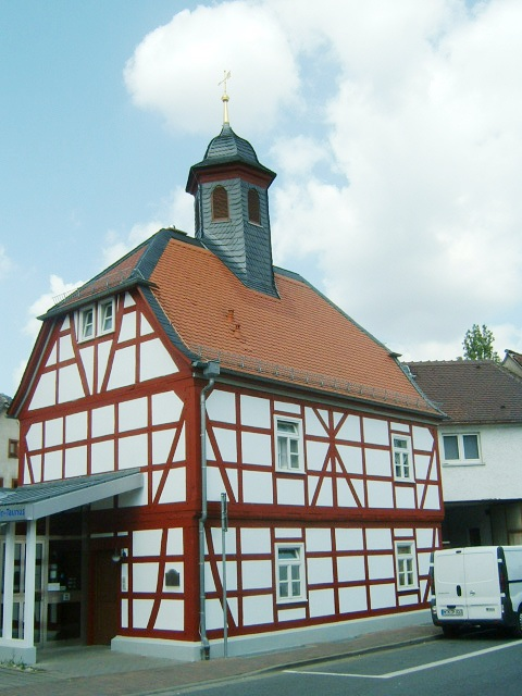 Altes Rathaus in Liederbach am Taunus, erbaut 1691